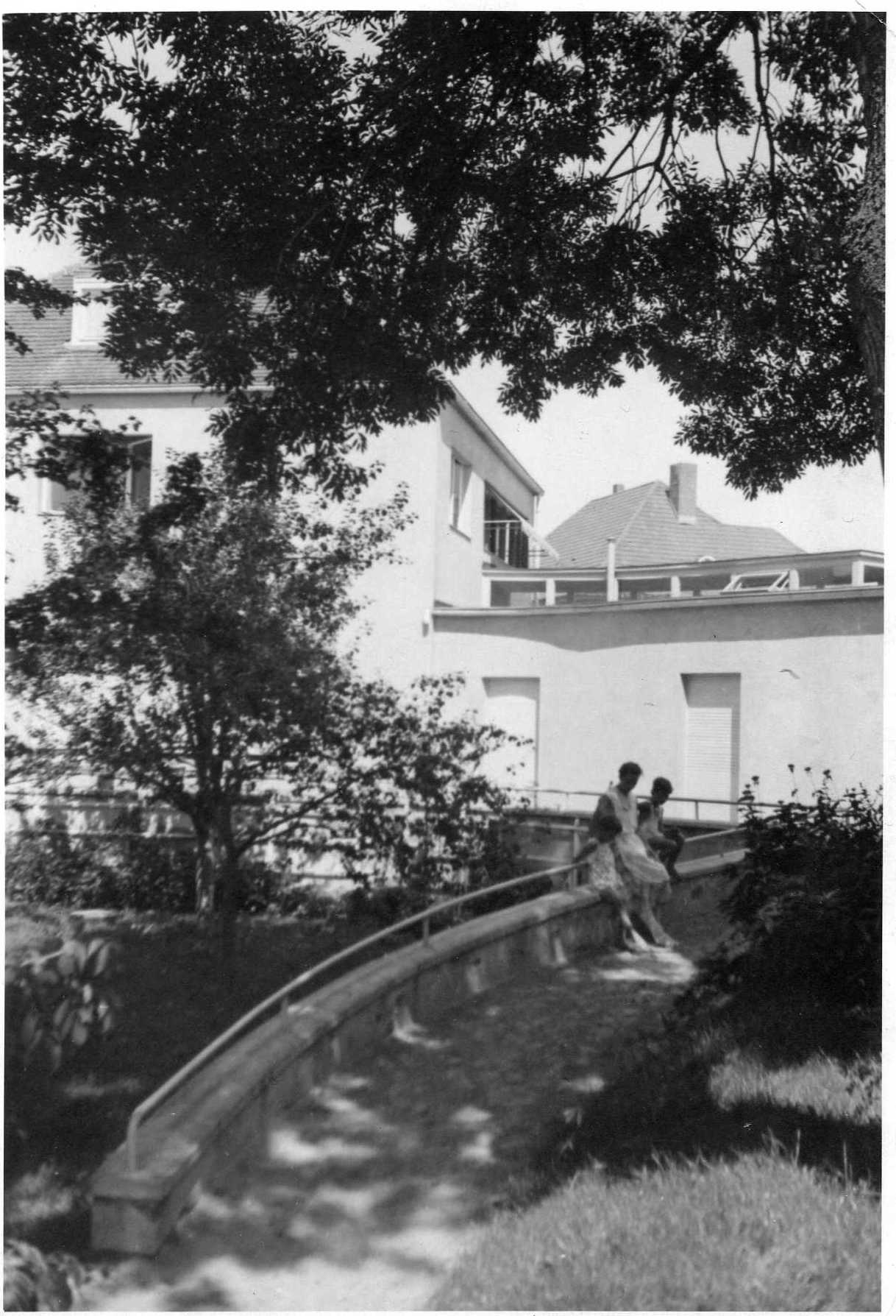 Haus Dr. Estrich, Jüterbog, Gartenansicht